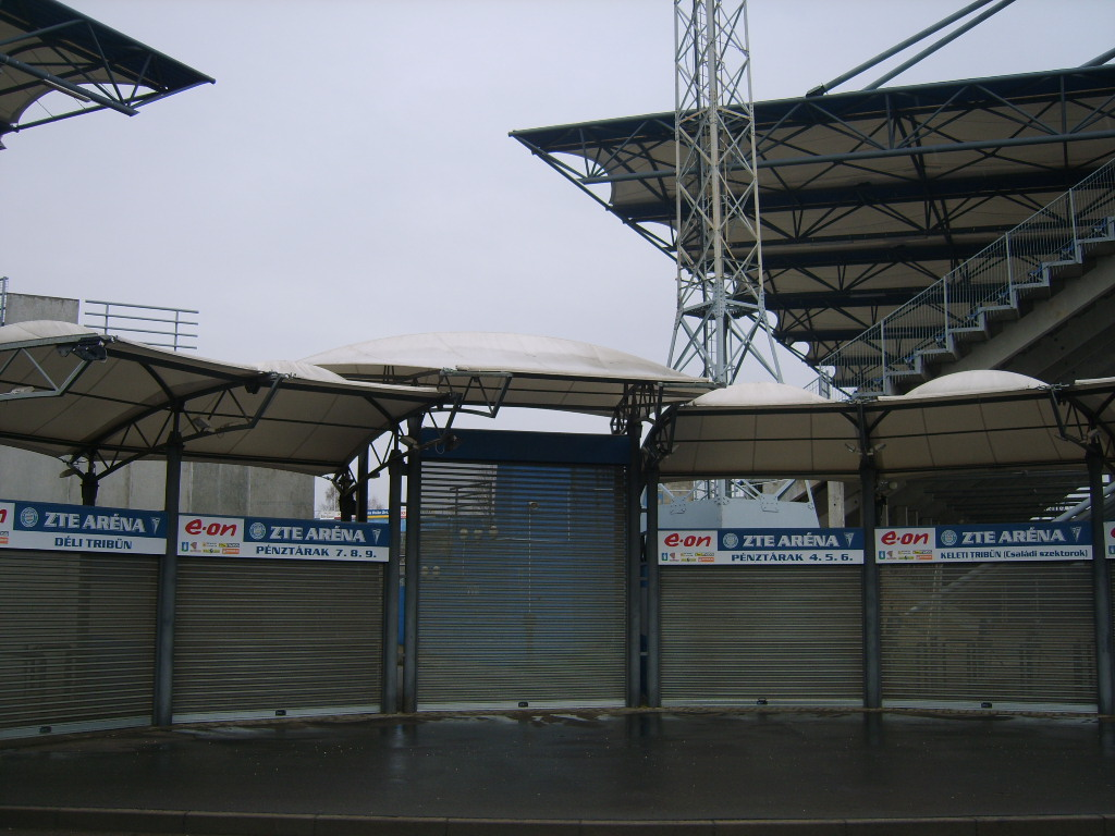 Stadium entry ZTE Arena / A ZTE stadionjának bejárata